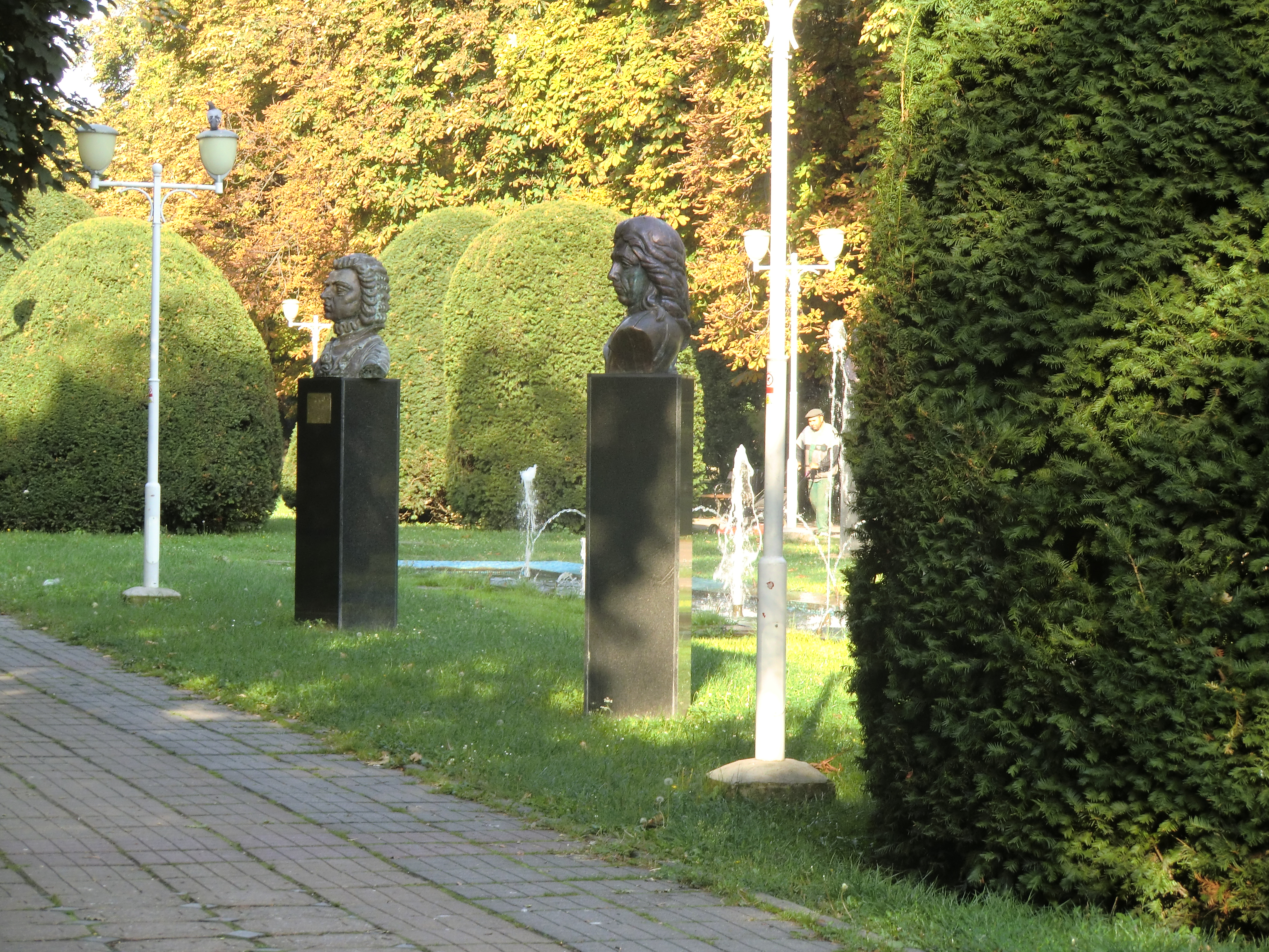 Zentralpark von Timișoara